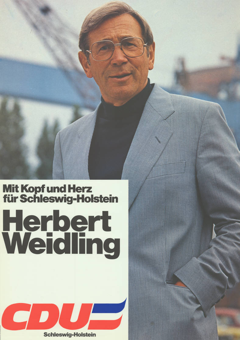 Mit Kopf und Herz für Schleswig-Holstein Herbert Weidling CDU Schleswig-Holstein Abbildung: Foto Plakatart: Kandidaten-/Personenplakat mit Porträt Auftraggeber: Verantw.: CDU Schleswig-Holstein Objekt-Signatur: 10-012 : 441 Bestand: Landtagswahlplakate Schleswig-Holstein (10-012) GliederungBestand10-18: Landtagswahlplakate Schleswig-Holstein (10-012) » Landtagswahl am 29.4.1979 » Kandidatenplakate Lizenz: KAS/ACDP 10-012 : 441 CC-BY-SA 3.0 DE